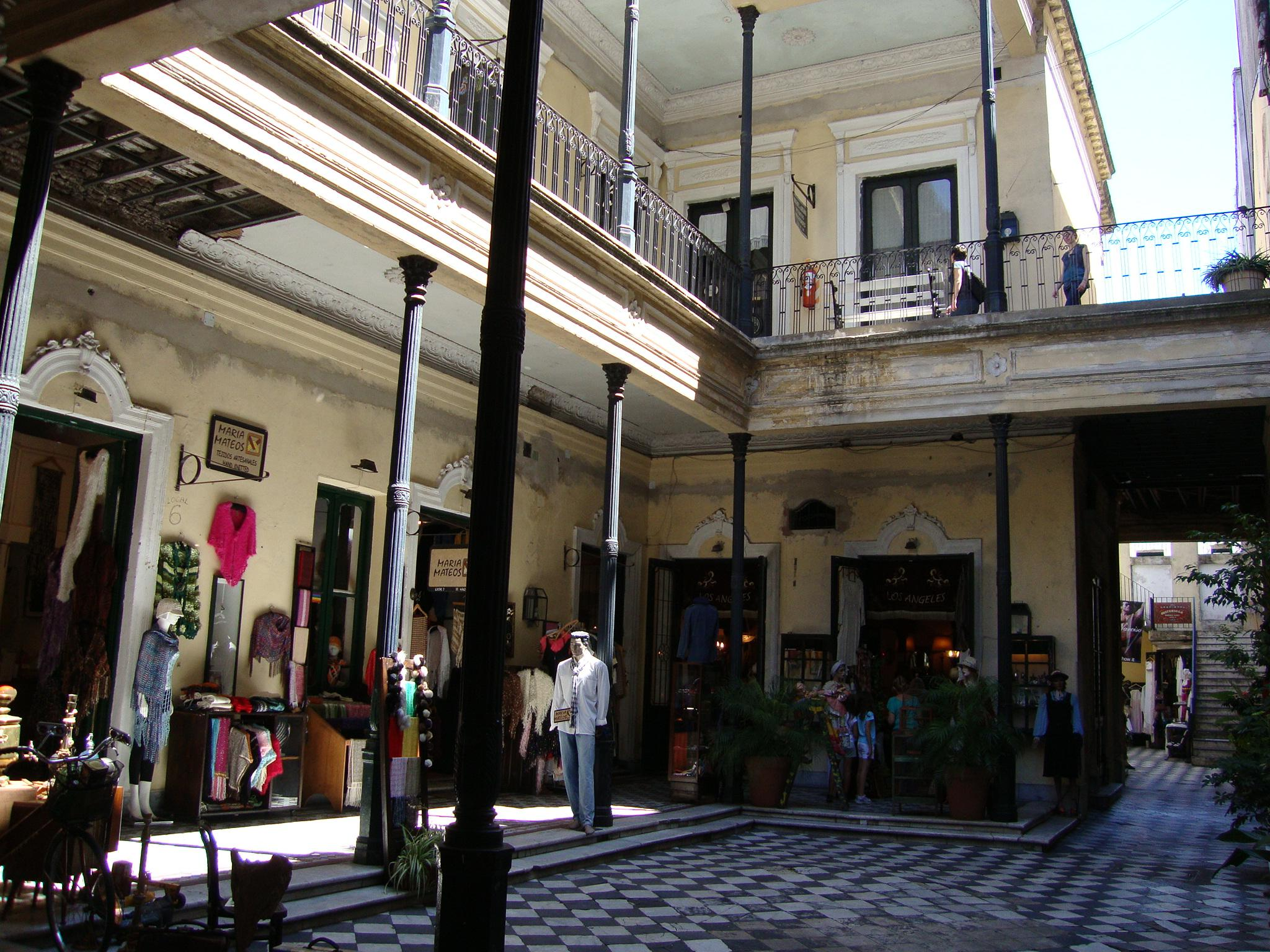 Segundo patio interno de la Casa de la familia Ezeiza, actual galería comercial Pasaje de la Defensa. Calle Defensa nº 1179. Año 1876.